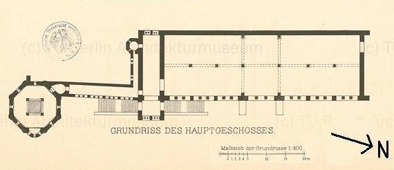 Kaisersaal Goslar, Grundriss 1875